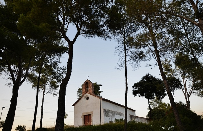 Ermita de Santa Eulàlia (Begues)